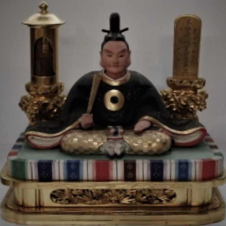 戸川達安の木像。